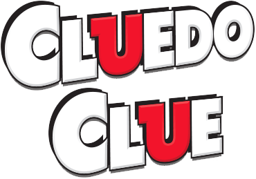 Cluedo logo